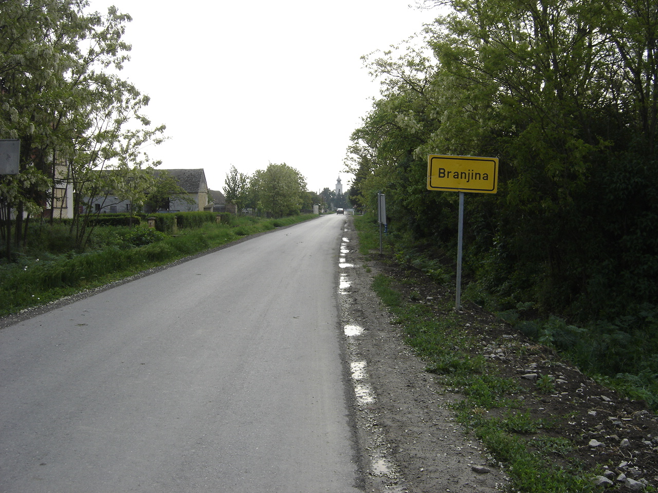 Tabla na ulazu u naselje Branjina u Baranji